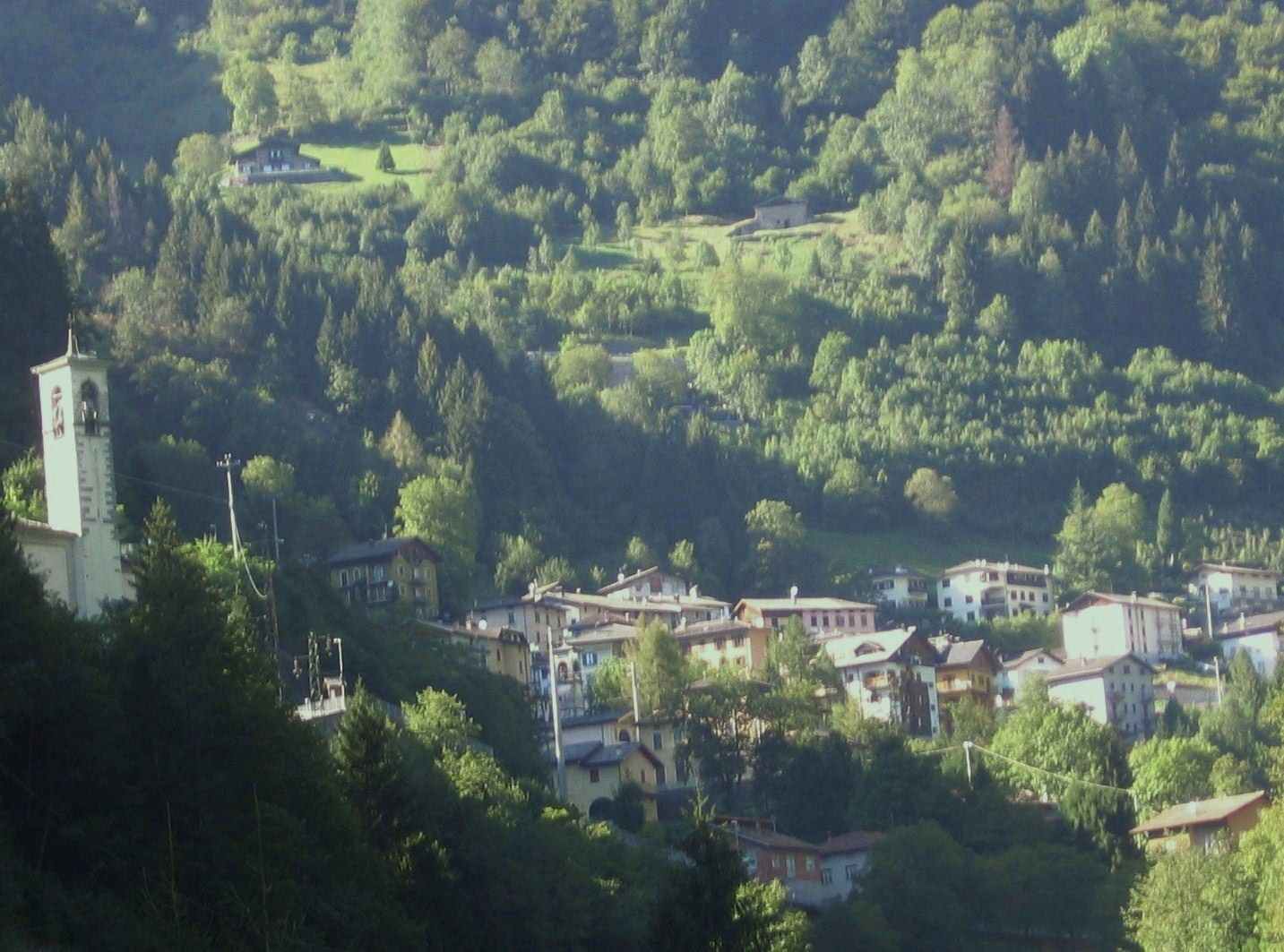 Mezzoldo, Bergamo, Italy